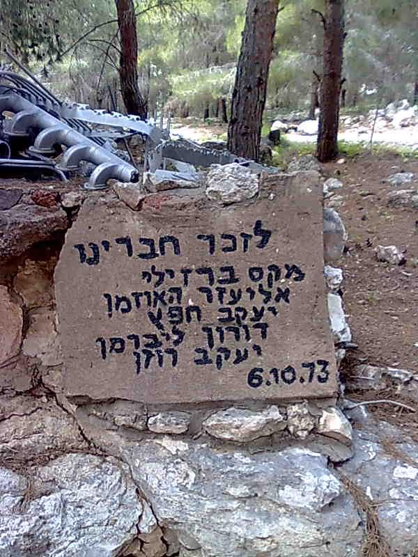 אנדרטה לזכר חללי יחידת הבקרה 528, שנפלו ביום הראשון של מלחמת יום הכיפורים